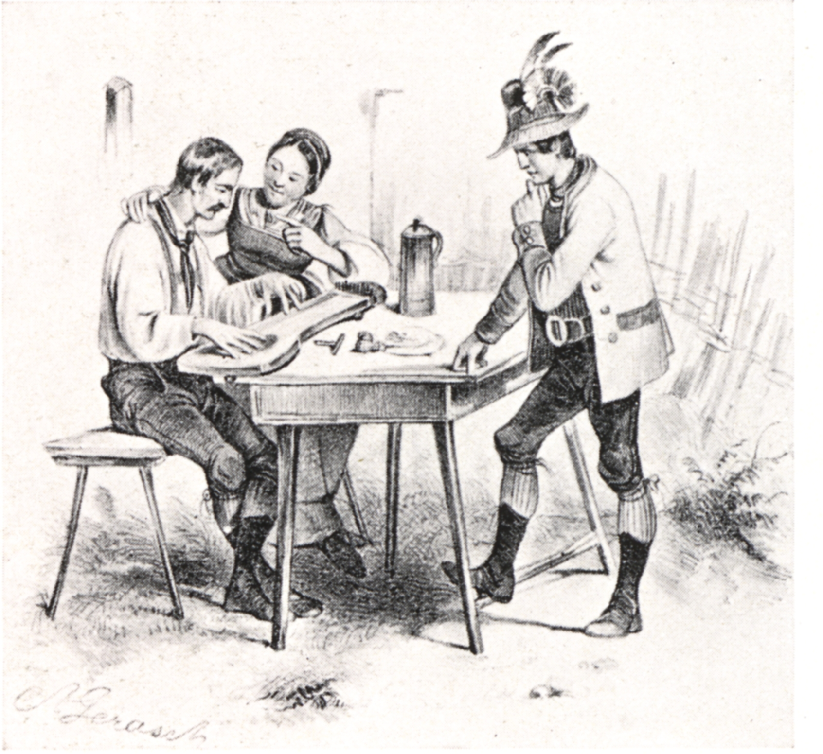 Steirisches Trachtenbuch - Mautner-Geramb 1935 Traditional Costumes from Ennstal, Styria